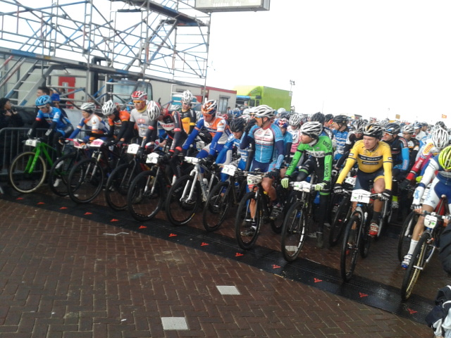 Start Egmond-pier-Egmond 2014 3e van links: Ellen van Dijk 3e van rechts: Laurens ten Dam